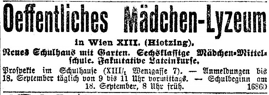 Wien-Hietzing, Mädchenlyzeum, erstes Jahr (1906) im neuen Schulgebäude, Annonce, Neue Freie Presse